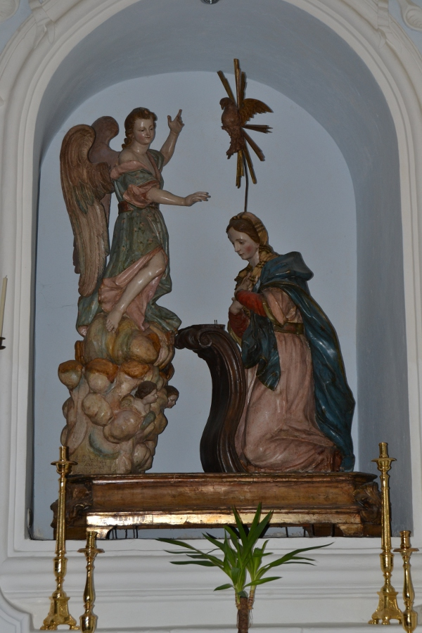 Gruppo ligneo inizi sec. XVIII in Chiesa della SS. Annunziata (Ceppaloni).